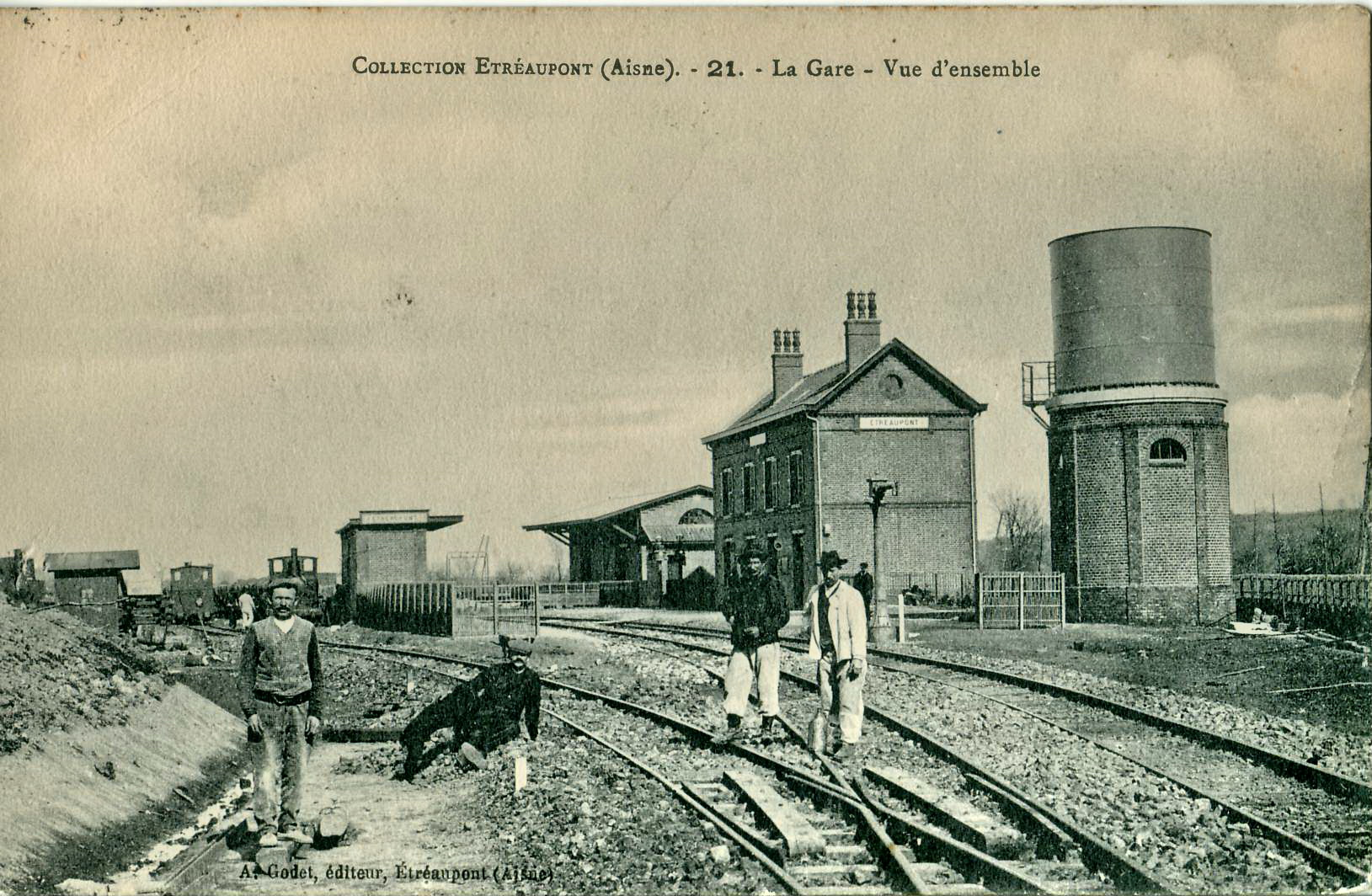 Carte postale ancienne éditée par Godet N°21 Étréaupont (Aisne) - La Gare - Vue d'ensemble